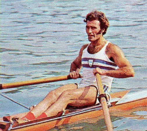 MUNCHEN/MONACO '72-PANINI-Figurina n.151- DEMIDDI - ARGENTINA -CANOTTAGGIO-Rec